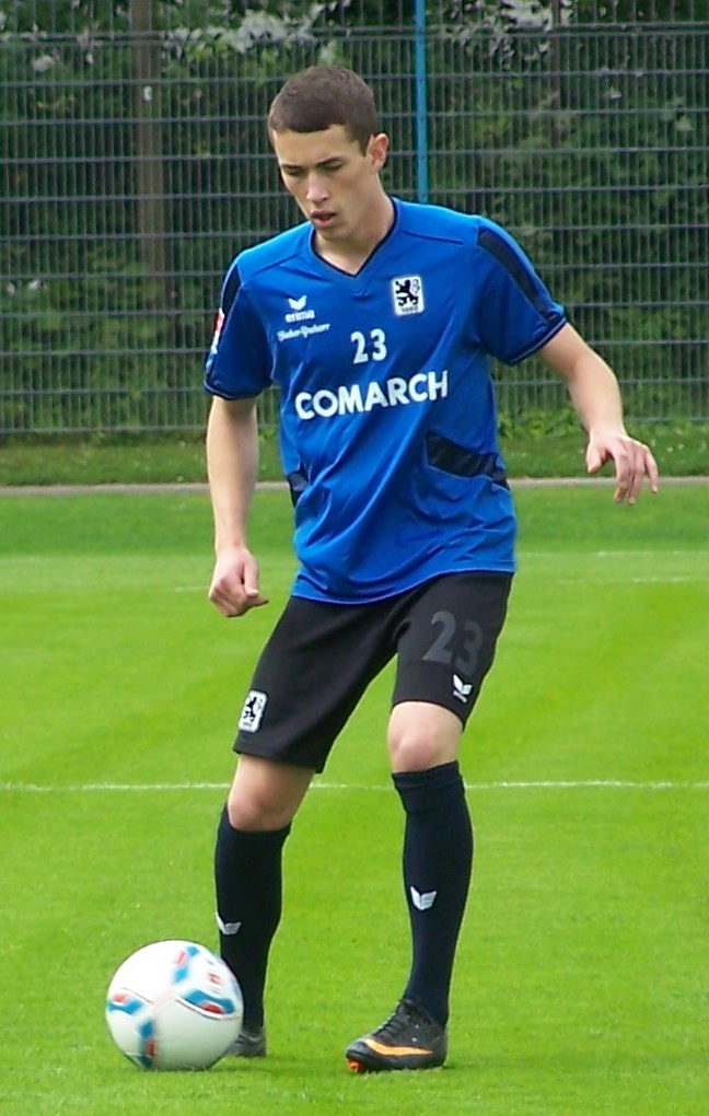 Philipp Steinhart, 1860 München, Training Grünwalder Straße